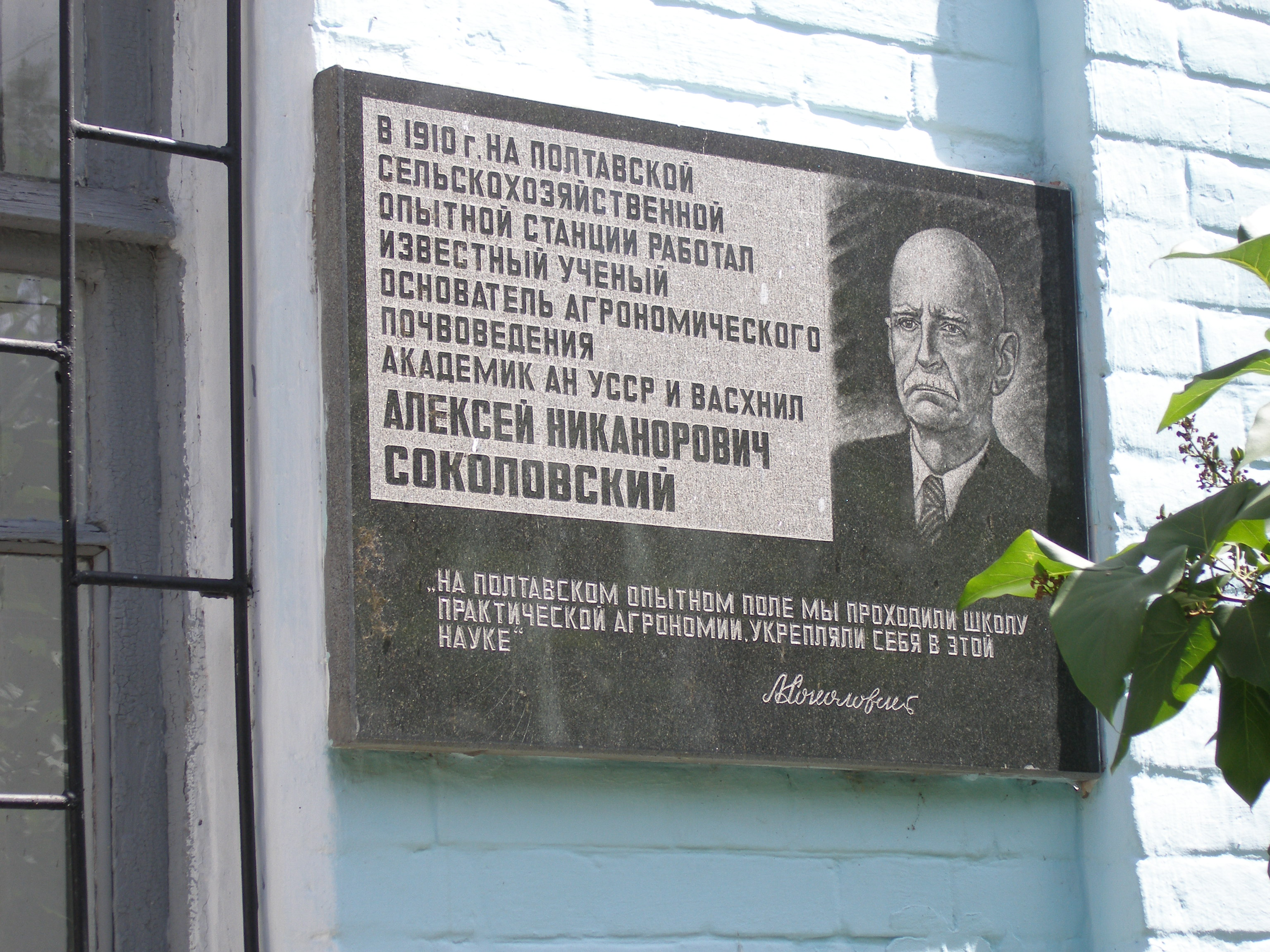 На Полтавському дослідному полі працював О.Н.Соколовський